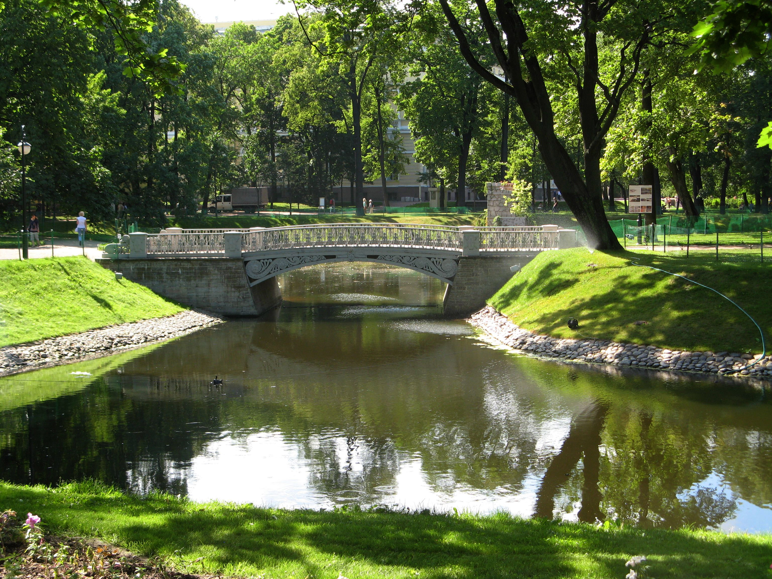 Мост в Михайловском саду (Санкт-Петербург, Михайловский сад)